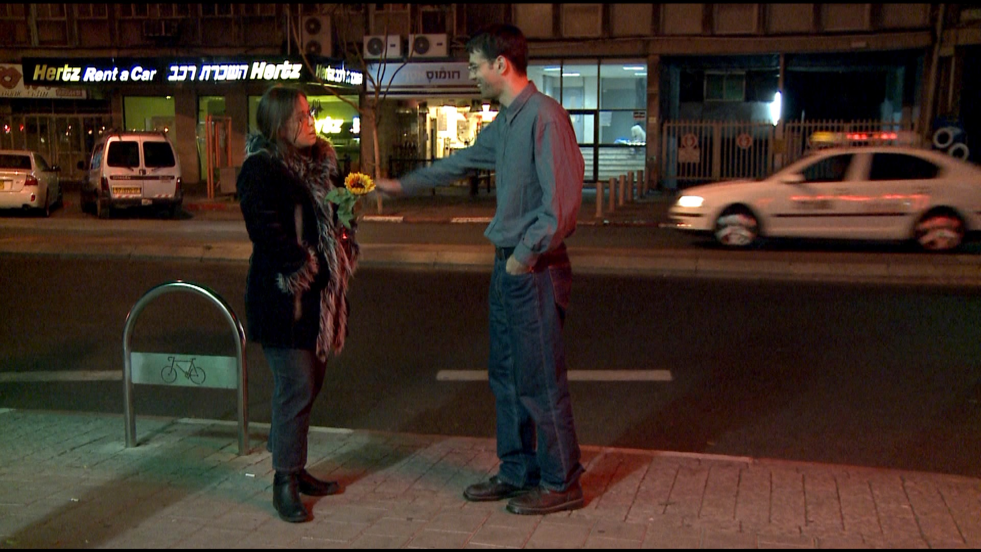 מתוך סרטה של טליה פינקל "טליה.דייט.קום", 2011